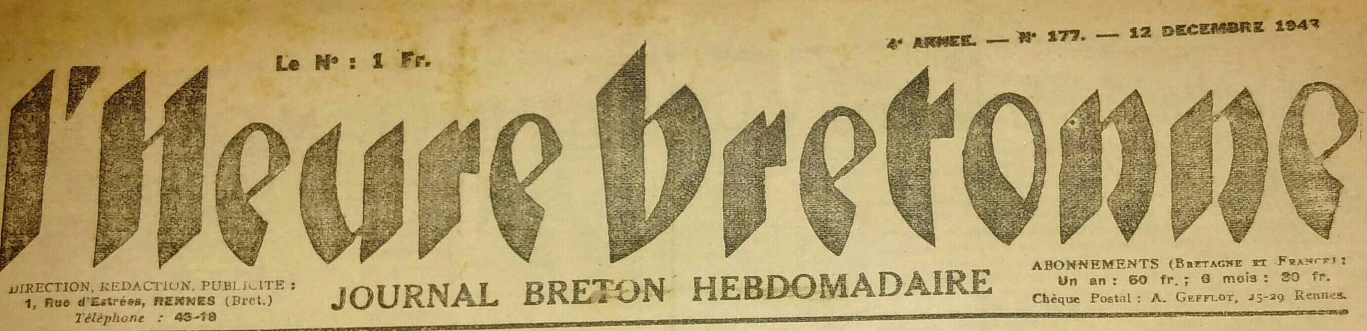 Logo ar gazetenn l'Heure bretonne kazetenn Strollad Broadel Breizh